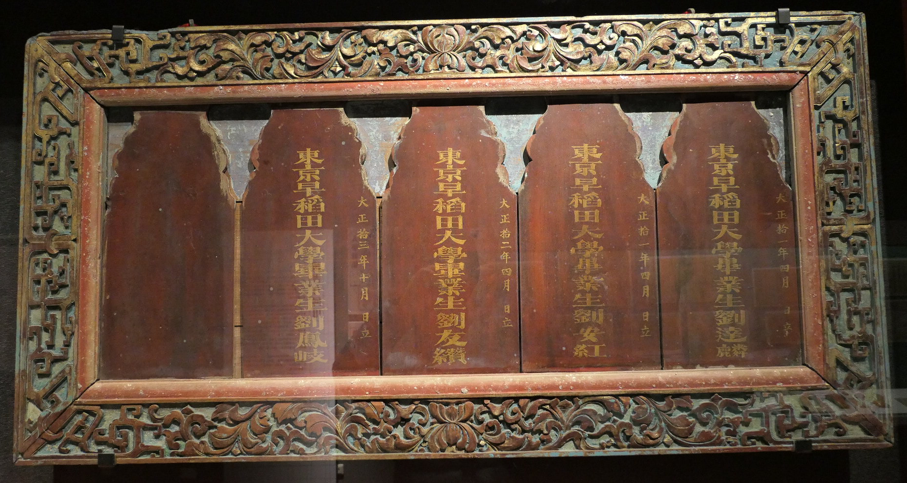 中文（台灣）: 日本時代木製升學榮譽榜牌匾。秋惠文庫所有。攝於國立臺灣歷史博物館。